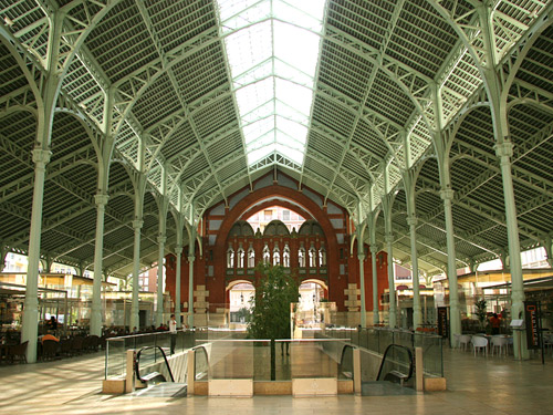 Mercado de Colón, Valencia, Spain.